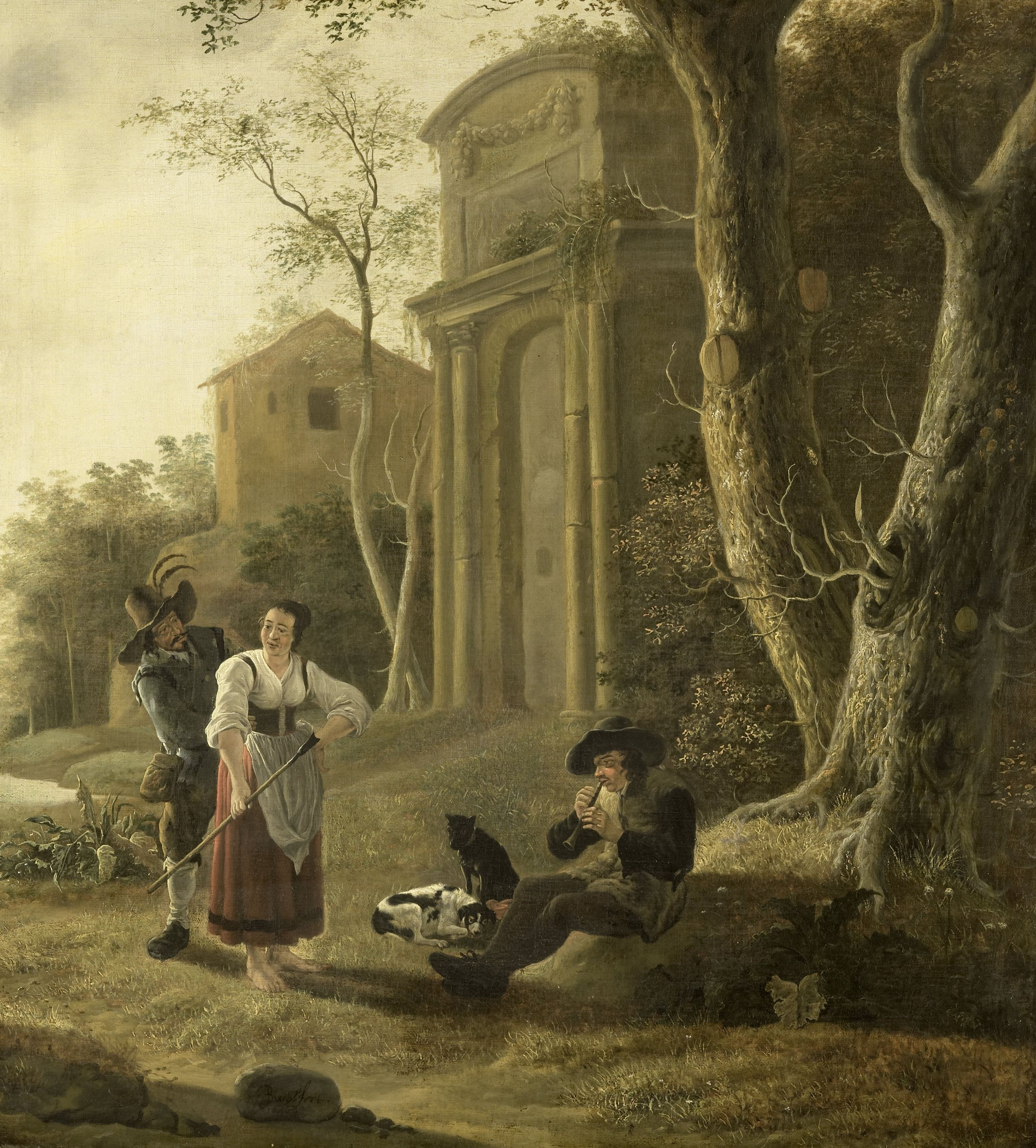 Herderstafereel met een schalmeispeler. Italiaans landschap met een zittende herder die op een herdersfluit speelt. Een andere man slaat zijn armen om de middel van een herderin die een staf in de handen houdt. Op de achtergrond een boerderij en een monumentaal klassiek gebouw.